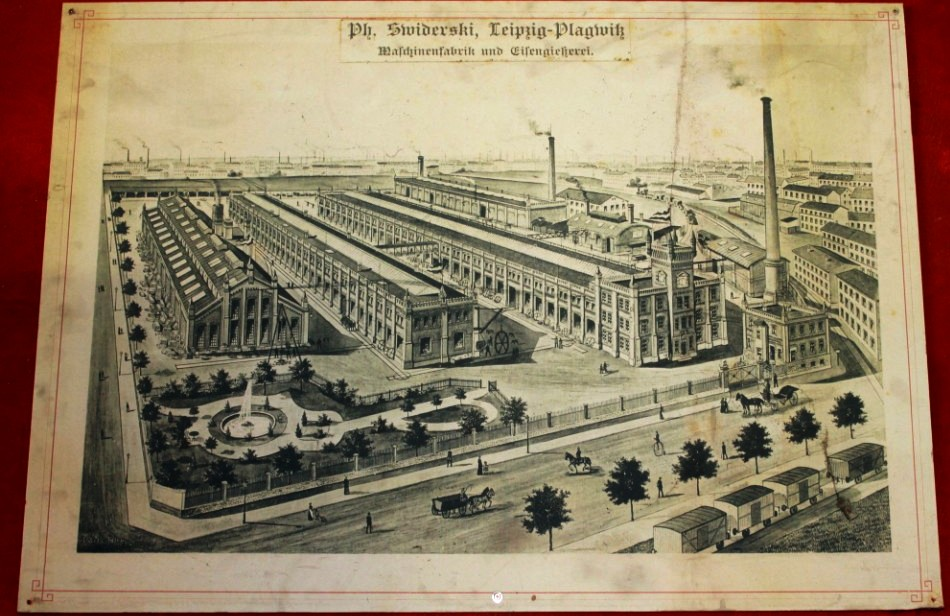 Bild der neuen Fabrik in Leipzig-Plagwitz